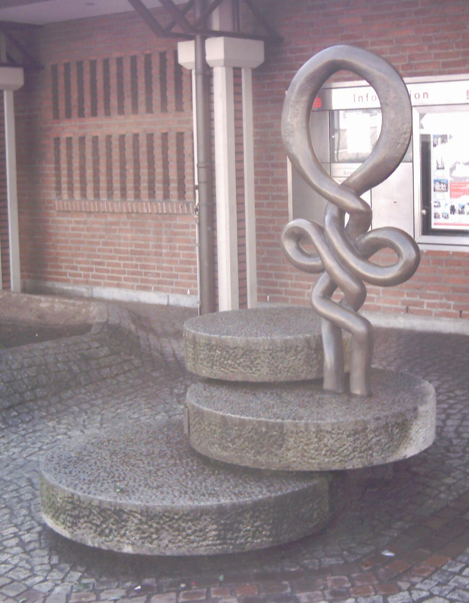 Nicht maßstabsgetreue Darstellung des Bieberer Amuletts vor der Sparkasse auf der Bieberer Hauptstraße. Das Werk wurde 1988 in Erinnerung an den 50. Jahrestag der Eingemeindung Biebers aufgestellt.